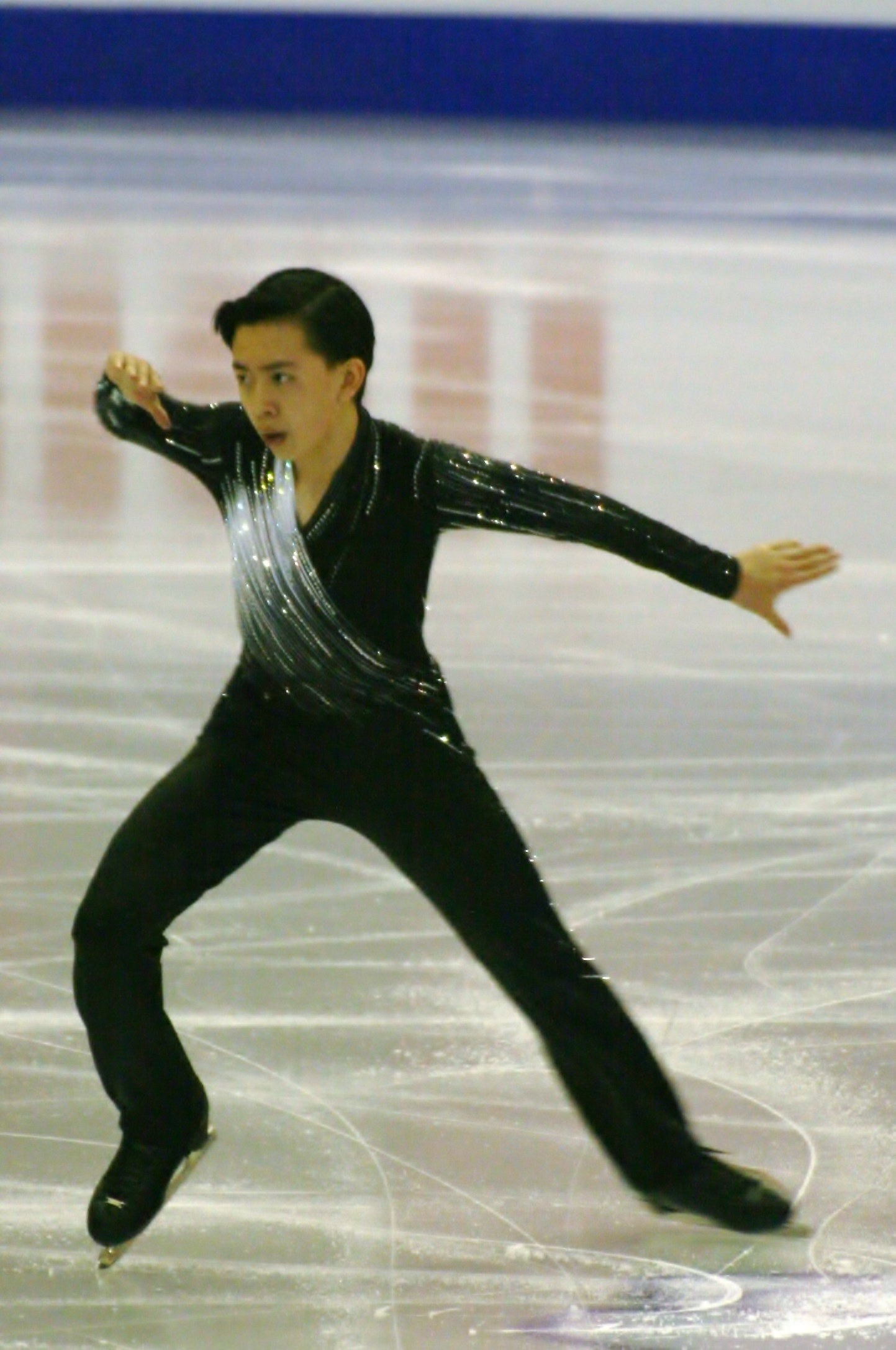 Винсент Чжоу (США) на финале Гран-при по фигурному катанию среди юниоров 2015-2016.